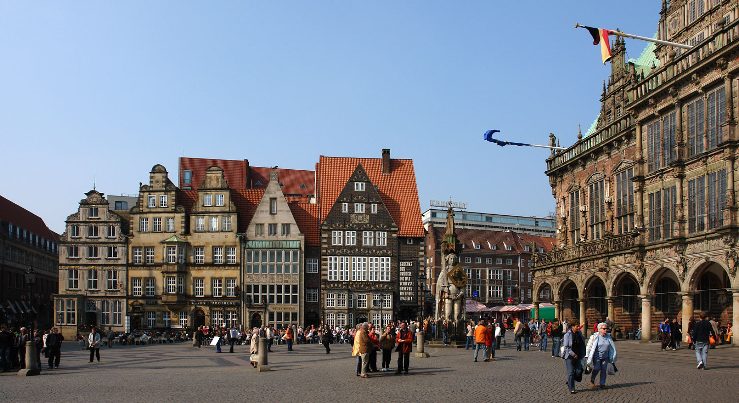 Bremer Marktplatz: Giebelhäuser an der Nordwestseite, Roland und Rathaus